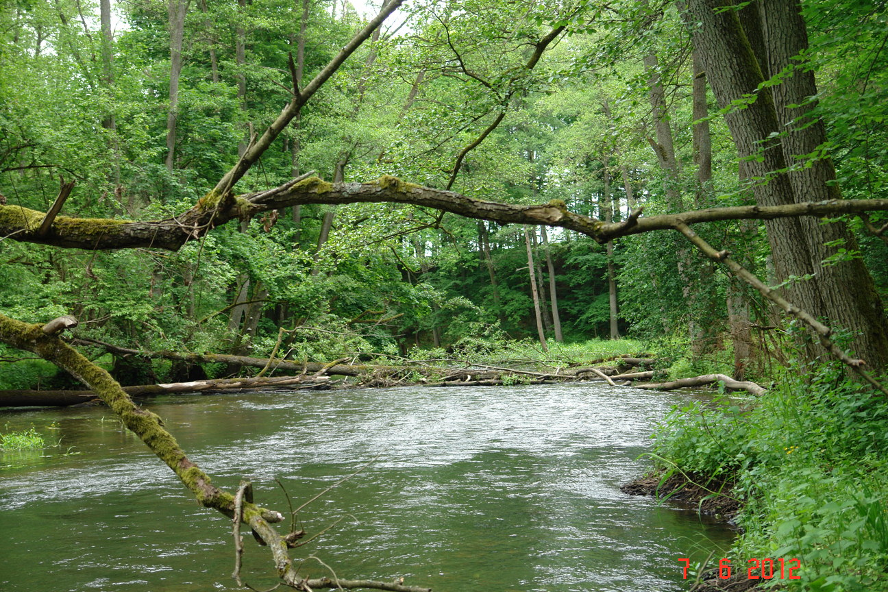 rzeka Pasłęka /odcinek od Kasztanowa do Stolna/